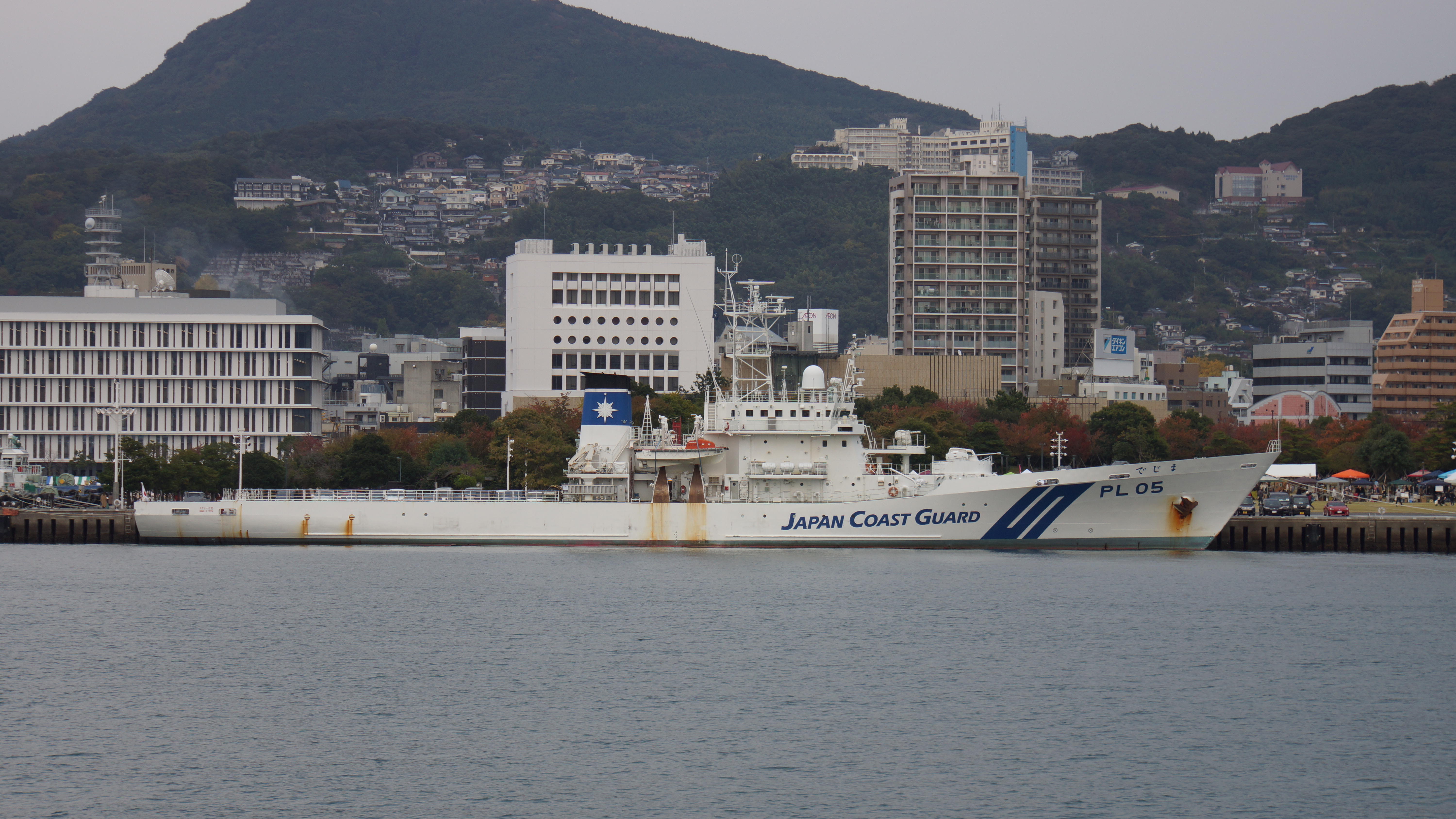 海上保安庁 巡視船てじま（PL-05） 右舷側面。2017年11月25日 長崎港にて。